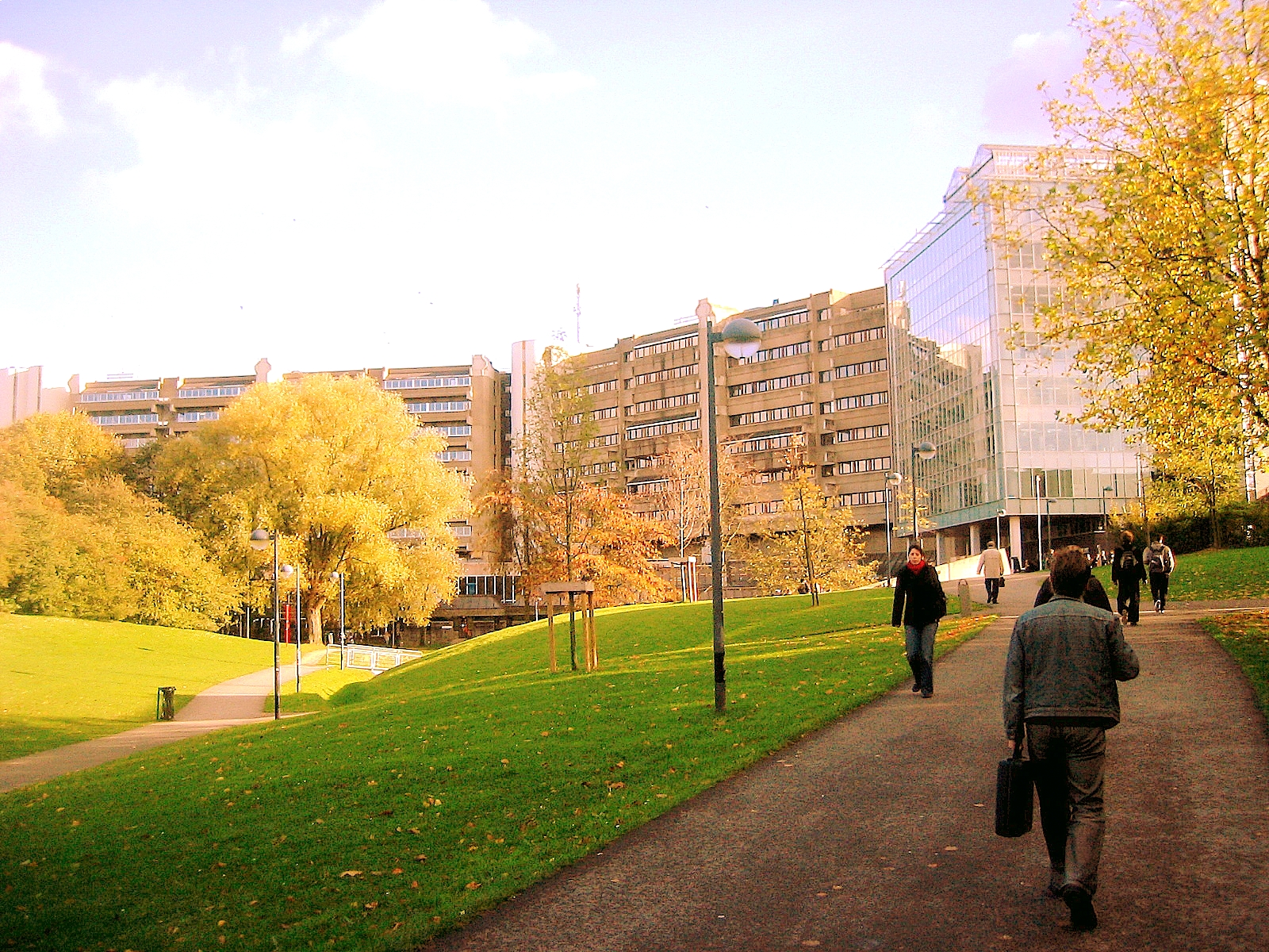 VUB campus